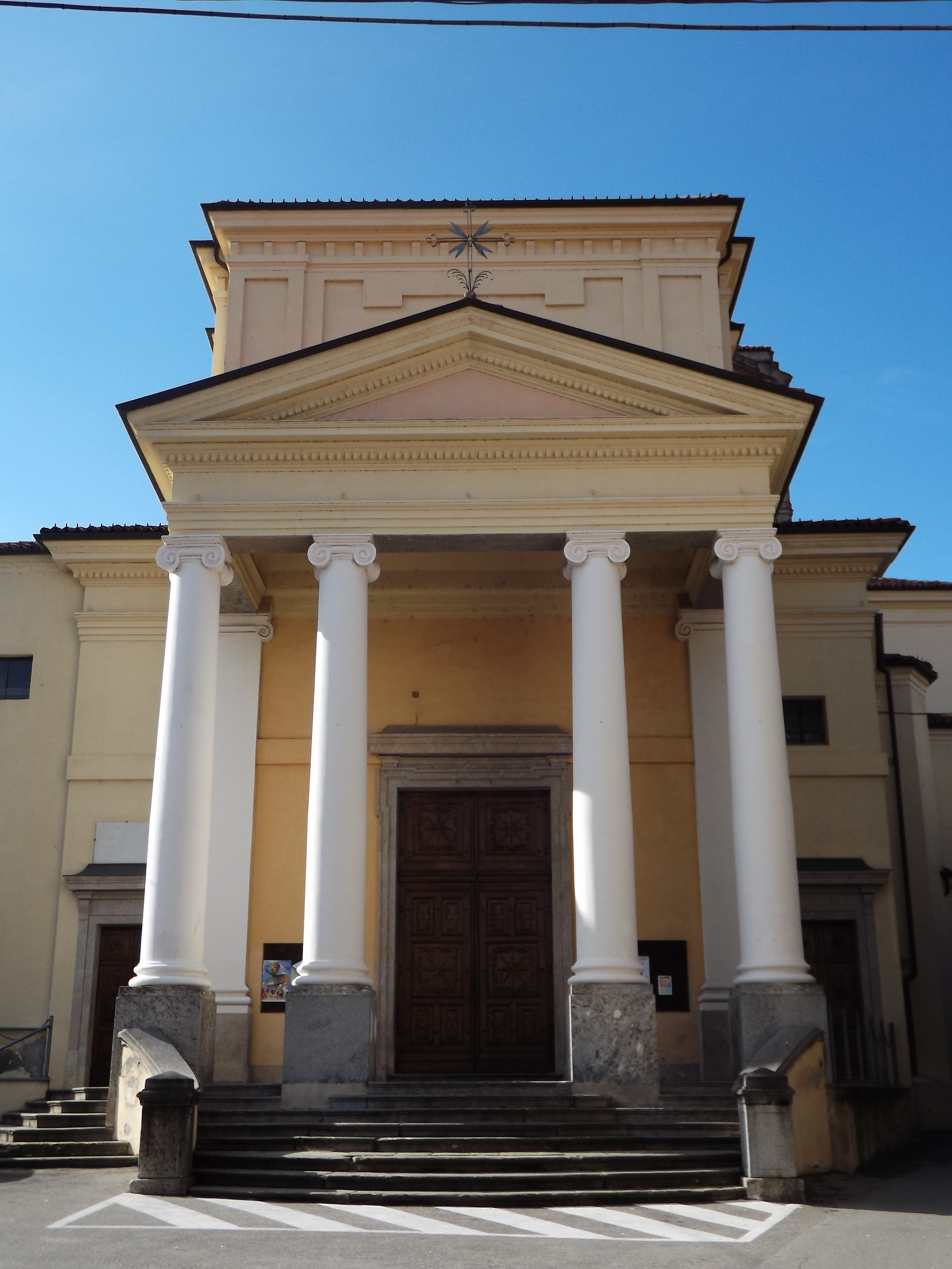 Chiesa parrocchiale San Dalmazzo di Cuorgnè. Vista frontale